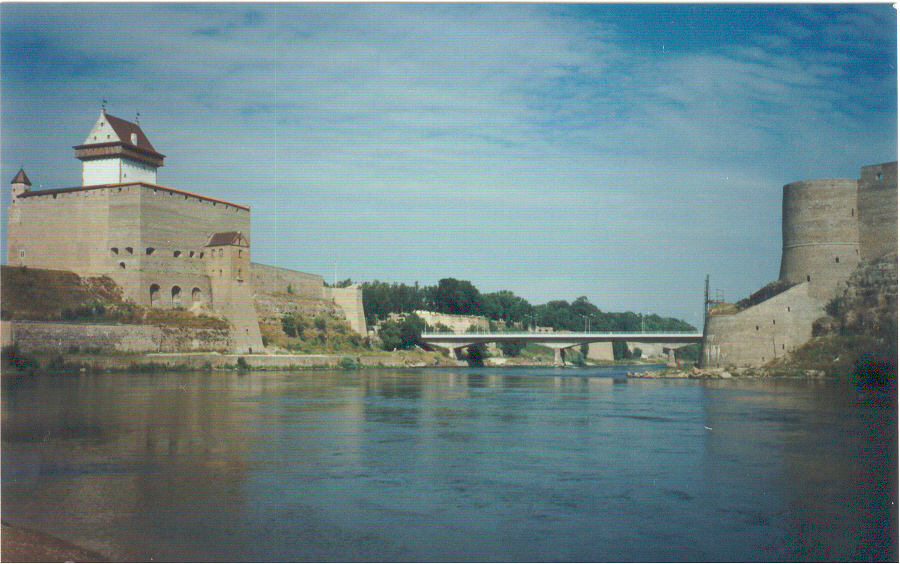 Estisk-russisk grense ved Narva